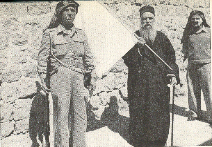 Rabbi Ben Zion Hazzan Ireq (72), Jerusalem, 28 March 1948.